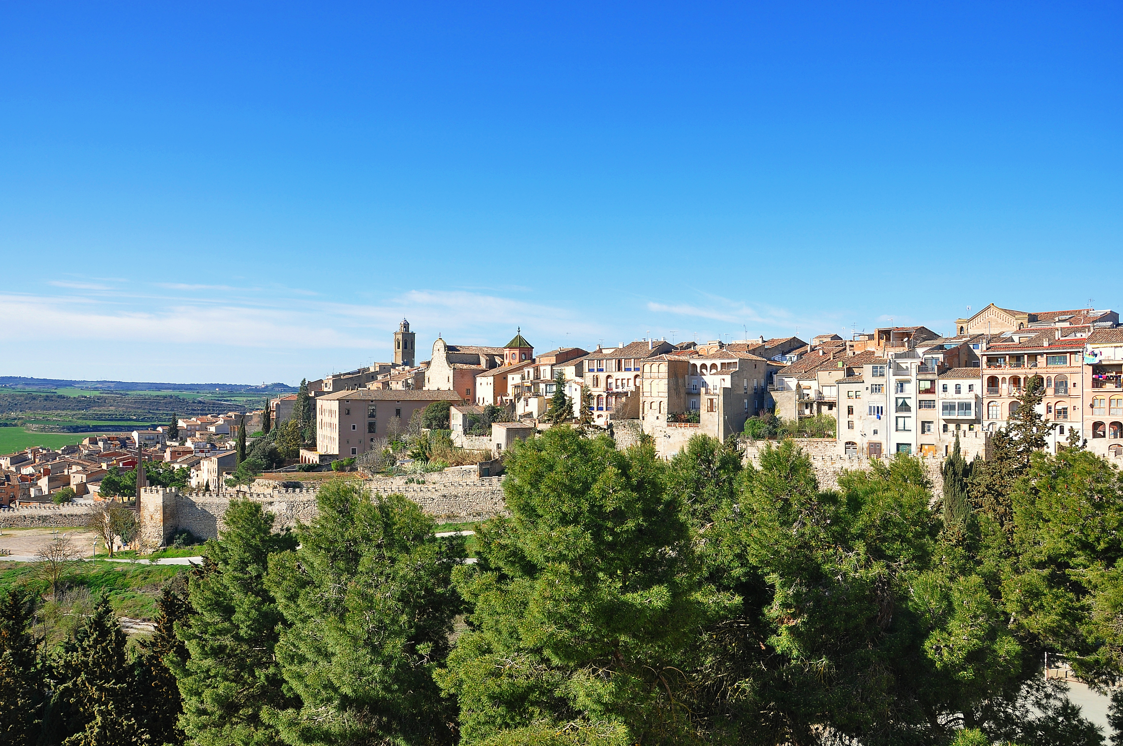 Cervera-2019